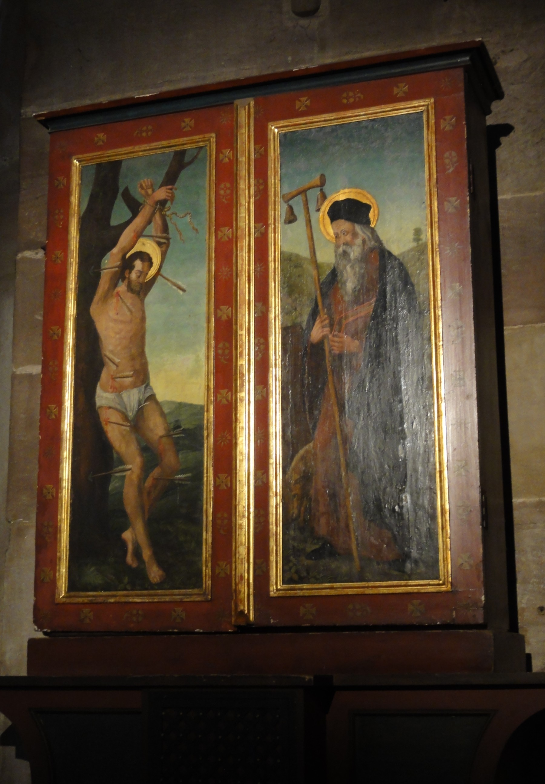 Alsace, Bas-Rhin, Cathédrale Notre-Dame de Strasbourg (PA00085015).Retable de Saint-Roch, Saint-Maurice et Saint-Nicolas (XVIe): Volets fermés: Peintures saint Sébastien et saint Antoine.